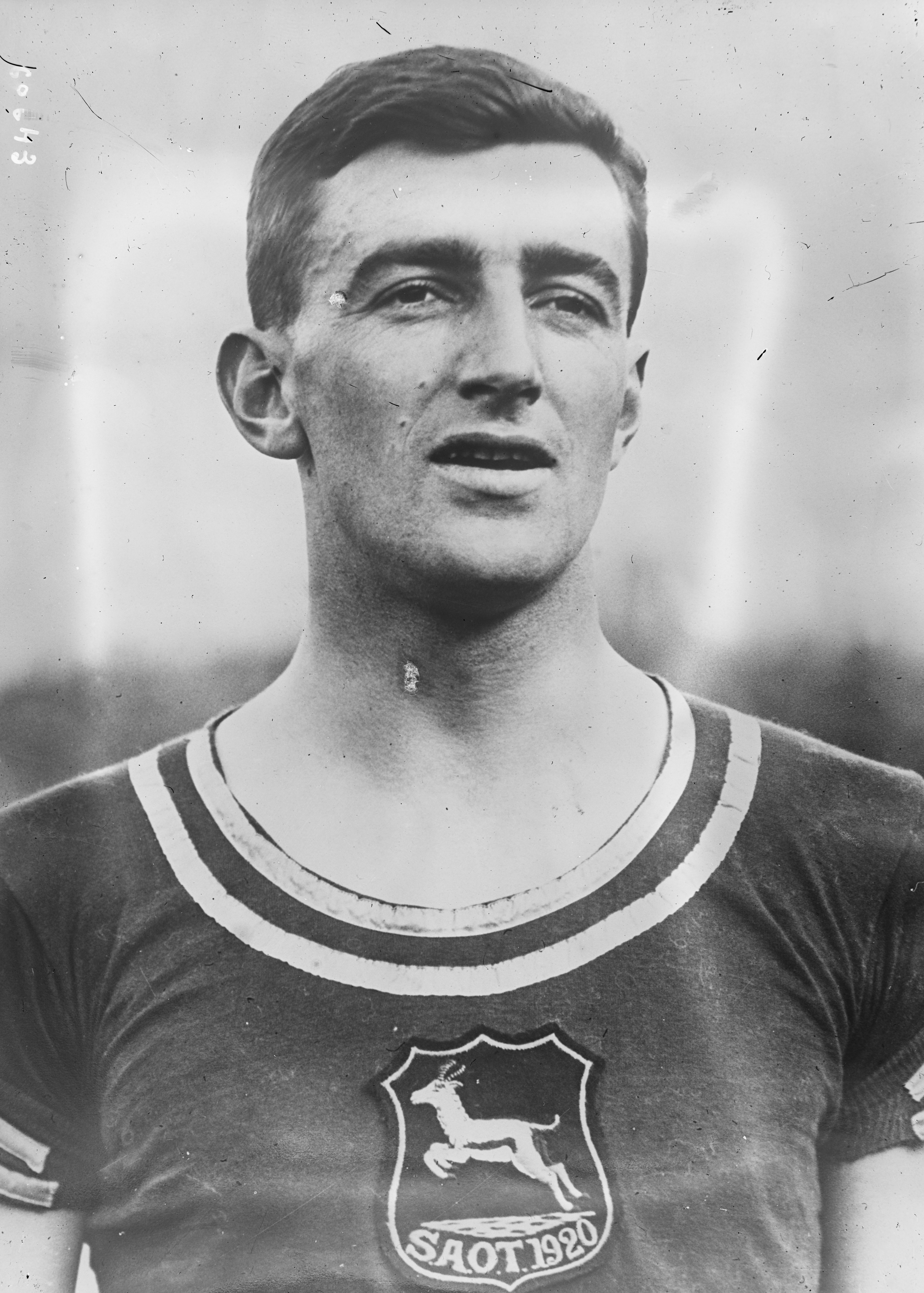 Bevil Rudd, gagnant de la finale du 400 m à Anvers [Jeux olympiques].